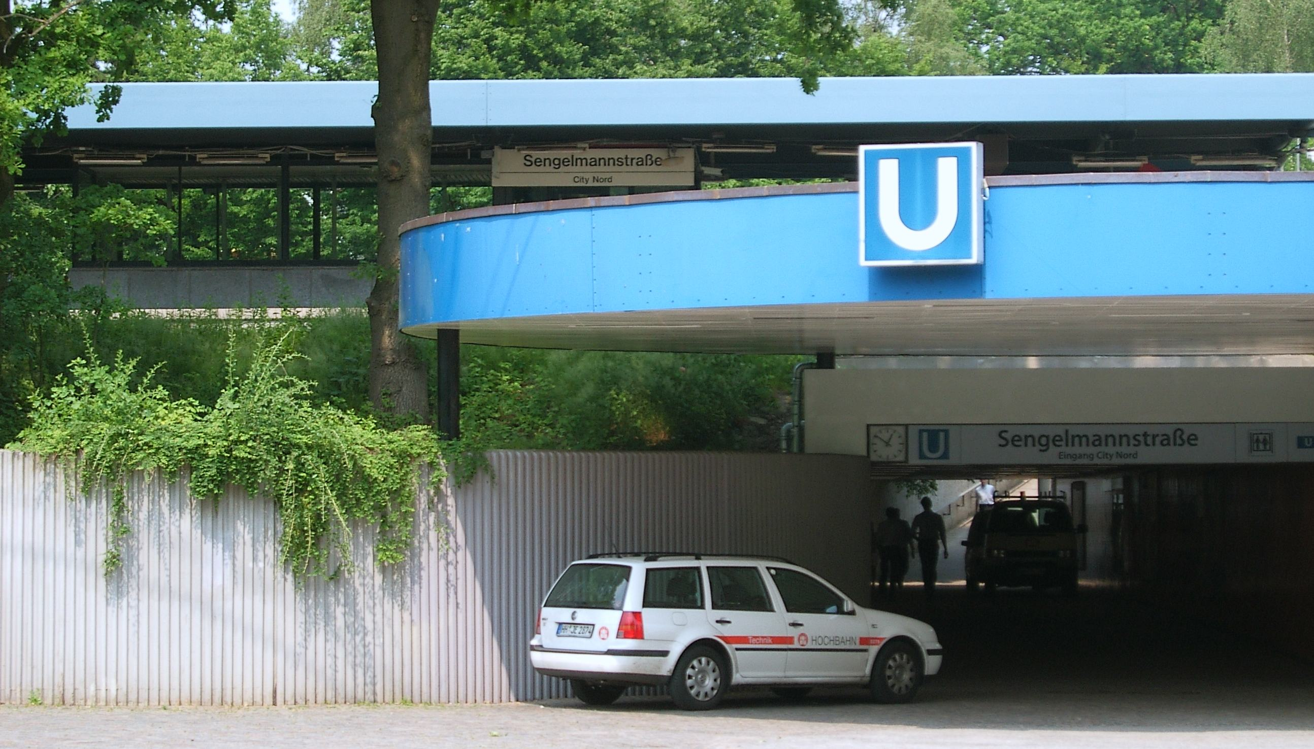 Bildbeschreibung: Hamburg, City Nord, U-Bahnstation (U1) Sengelmannstraße Fotograf: selbst Datum: 14.6.2006